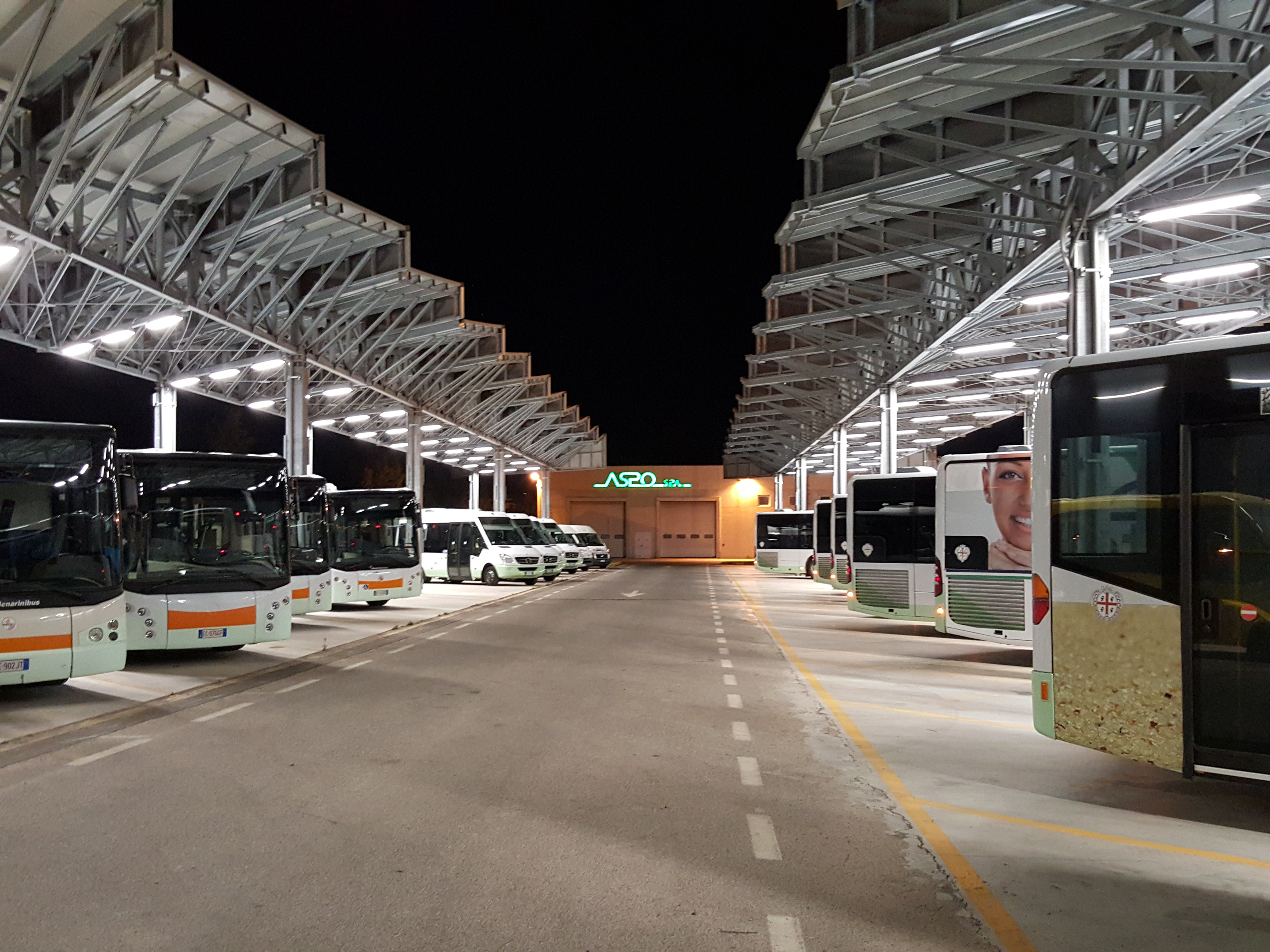 foto che riporta uno scorcio del deposito dell?azienda ASPO SPA